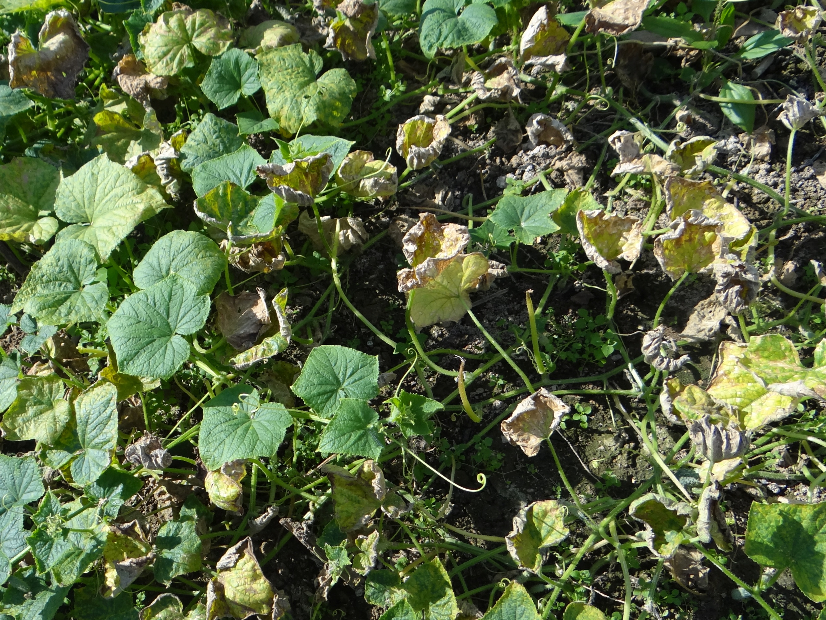 Pseudoperonospora cubensis on Cucumis sativus